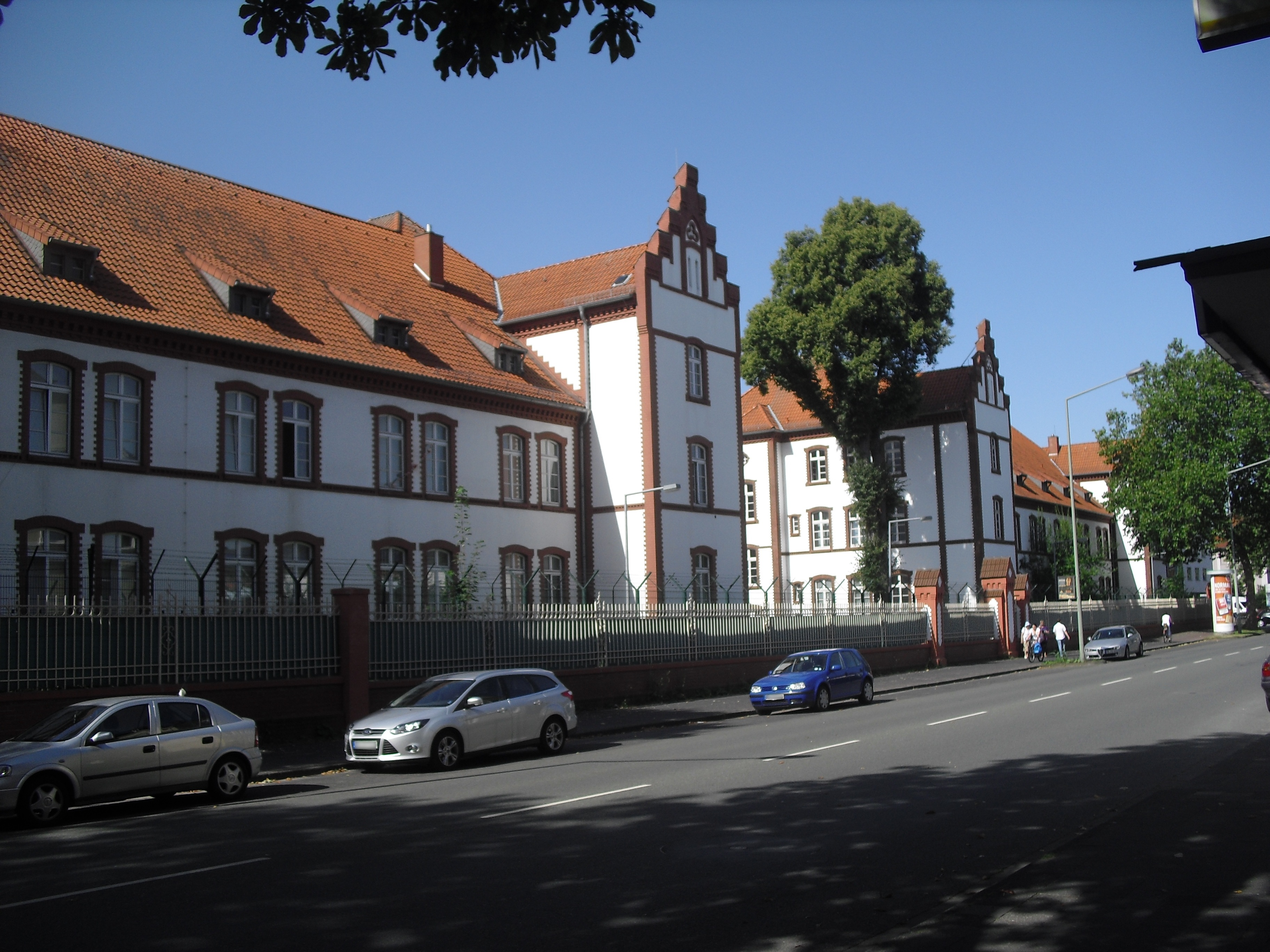 Alanbrooke-Kaserne, Elsener Str., Paderborn This is a photograph of an architectural monument.